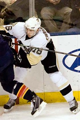 Erik Christensen during a Pittsburgh Penguins vs. Florida Panthers game